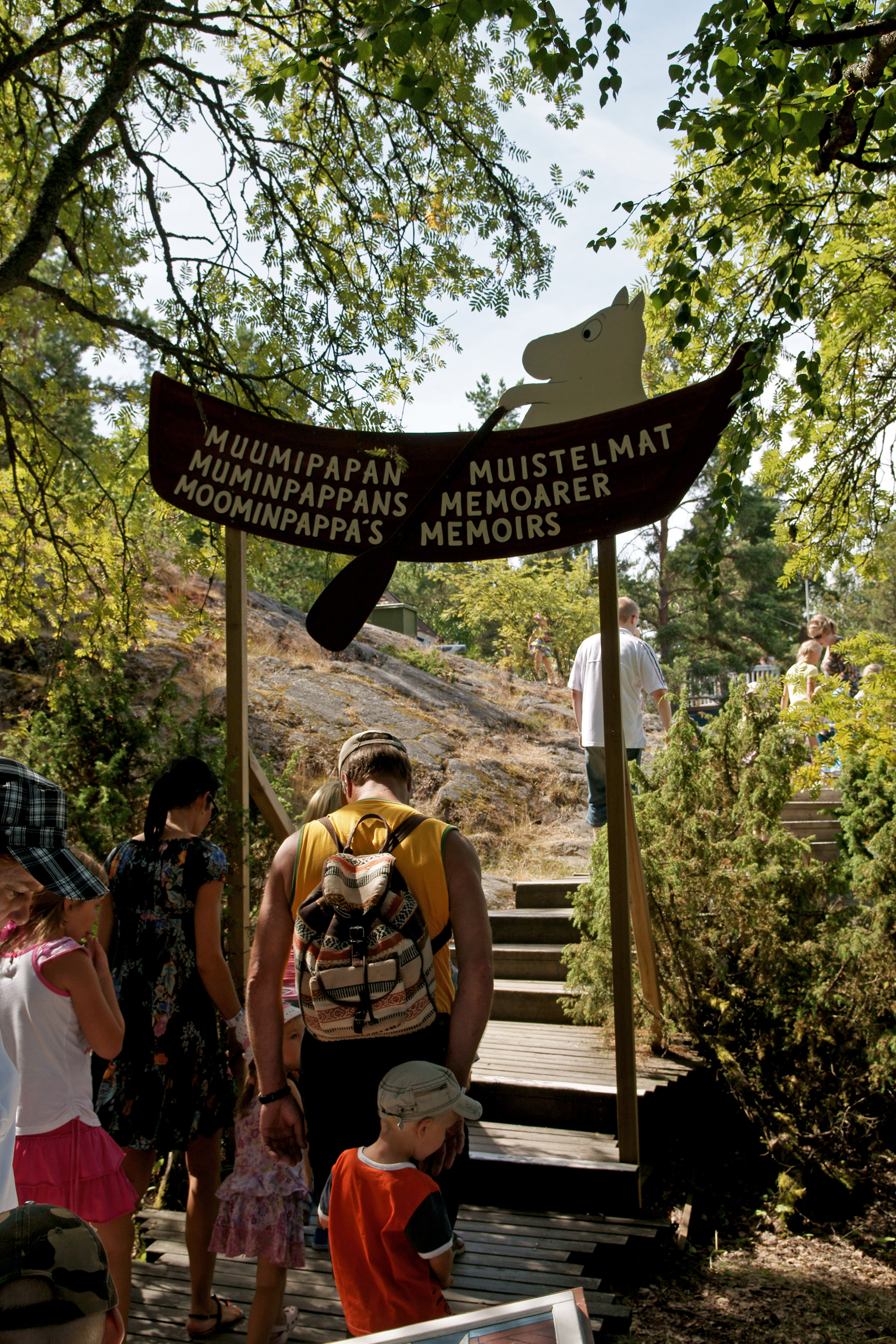 Portti Muumipapan muistelmiin Muumimaailmassa, Naantalissa.